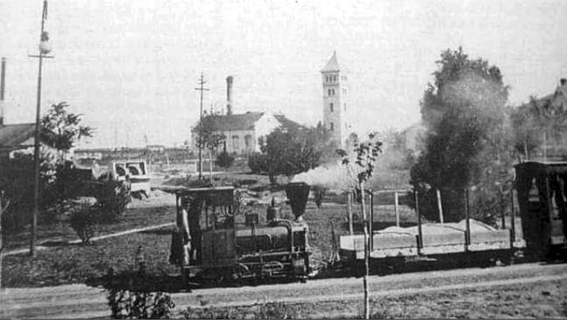 El inolvidable tren a vapor que circulaba por el gran predio del hospital en Lujan